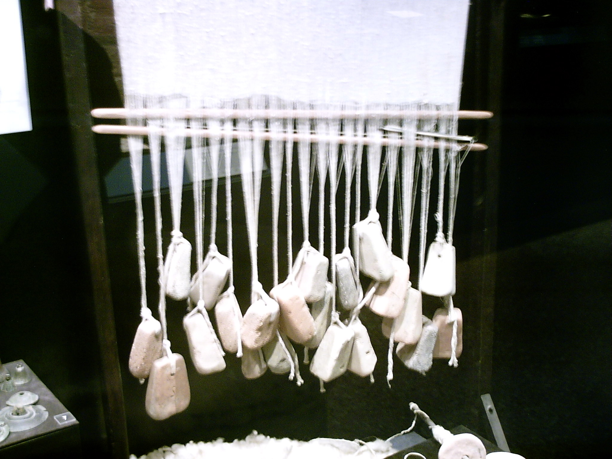 Peses d'un tel·lar romà. Es conserven al Museu de Badalona, Badalona, Barcelonès, (Catalunya).